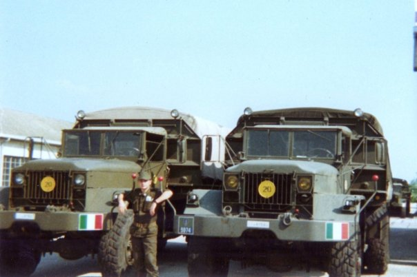 per concessione a Wikipedia del sig. Angelo Teora tratta dal sito alla pagina 3ª Brigata missili Aquileia e riguardante gli autocarri OM6600 del 13º Battaglione logistico di manovra ripresi nella Caserma "Capitò" a Portogruaro nel 1989 GFDL